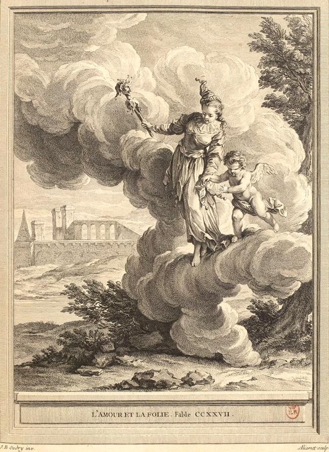 Gravure réalisée par Jacques Aliamet d'après un dessin de Jean-Baptiste Oudry représentant la fable L'amour et la folie de Jean de La Fontaine (fable 14 du livre XII). Cette gravure est parue dans l'édition complète des fables de La Fontaine, parue en quatre tomes chez l'éditeur Desaint & Saillant, rue saint Jean de Beauvais à Paris, 1755-1759.